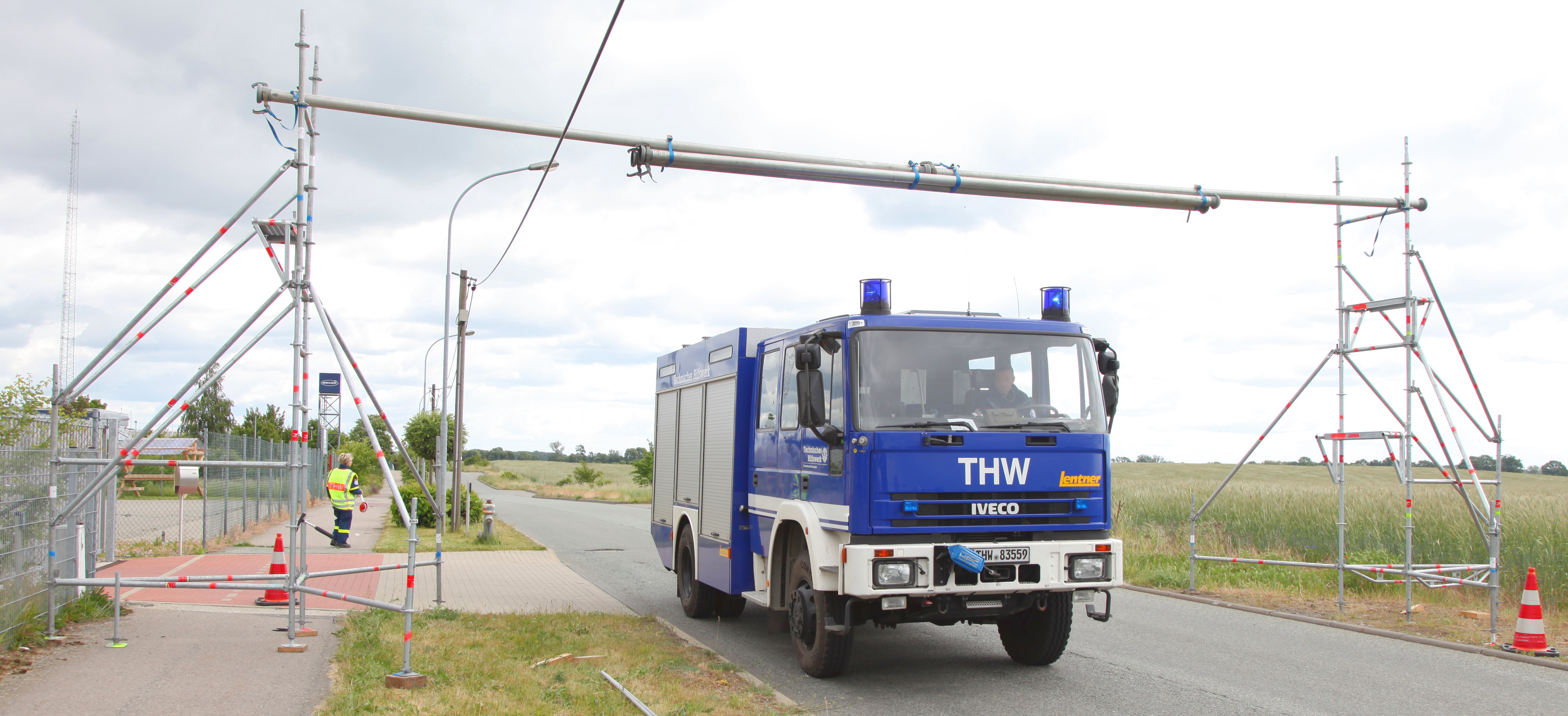 Straßenüberbauung mit dem EGS zur Wasserförderung über lange Strecken, mit im Bild: GKW1, THW OV Neuruppin